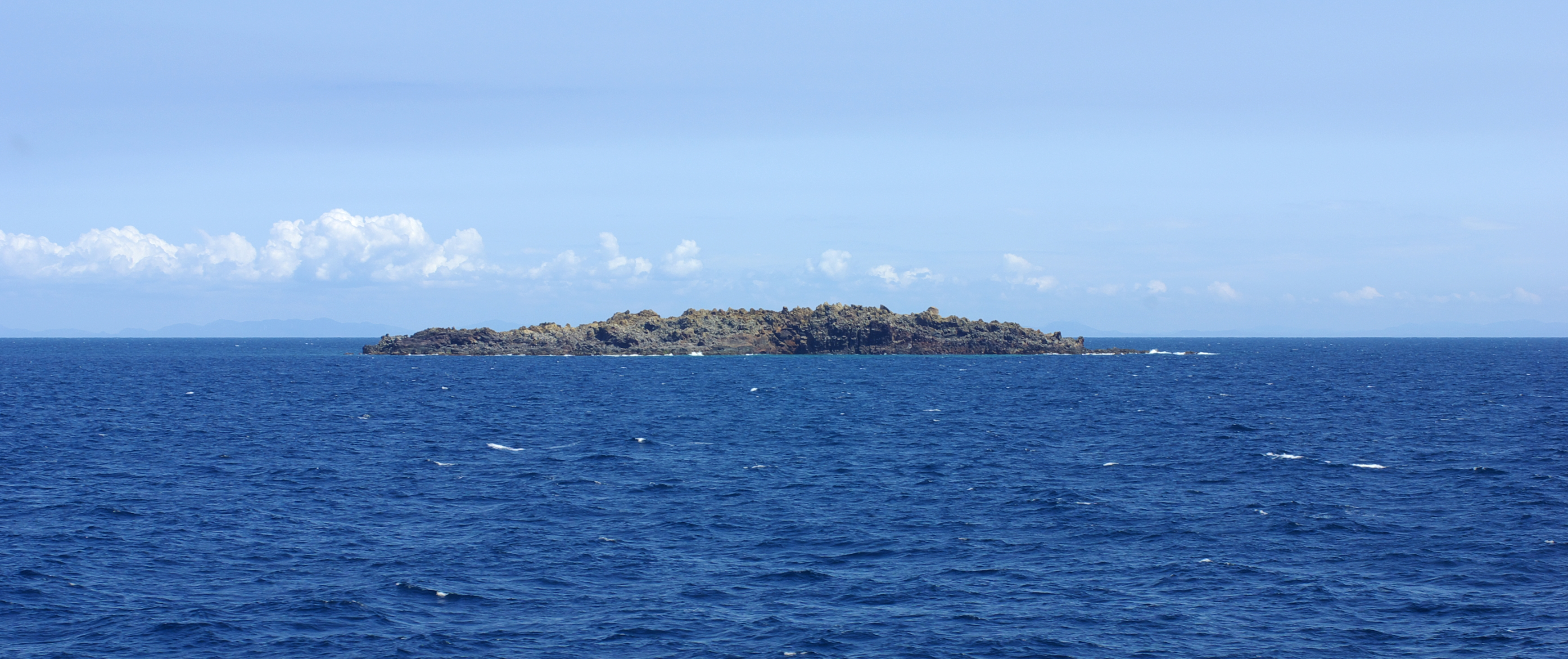 昭和硫黄島。南側より。フェリーみしま船上より撮影。